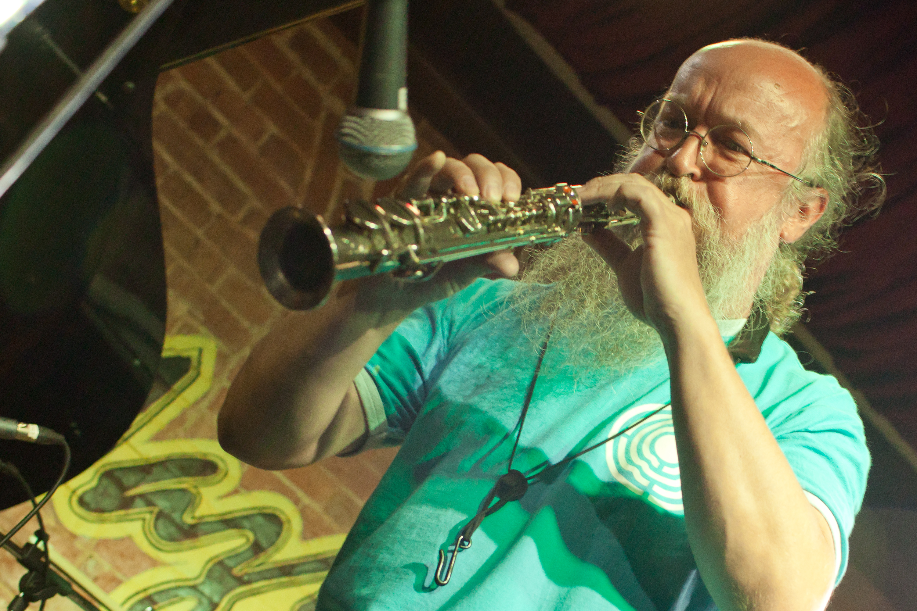 Фестиваль Leo Records в Джаз-кафе "Эссе", 2013